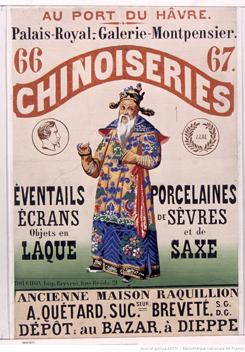 Affiche d'une boutique de chinoiseries au Havre et à Dieppe 1855